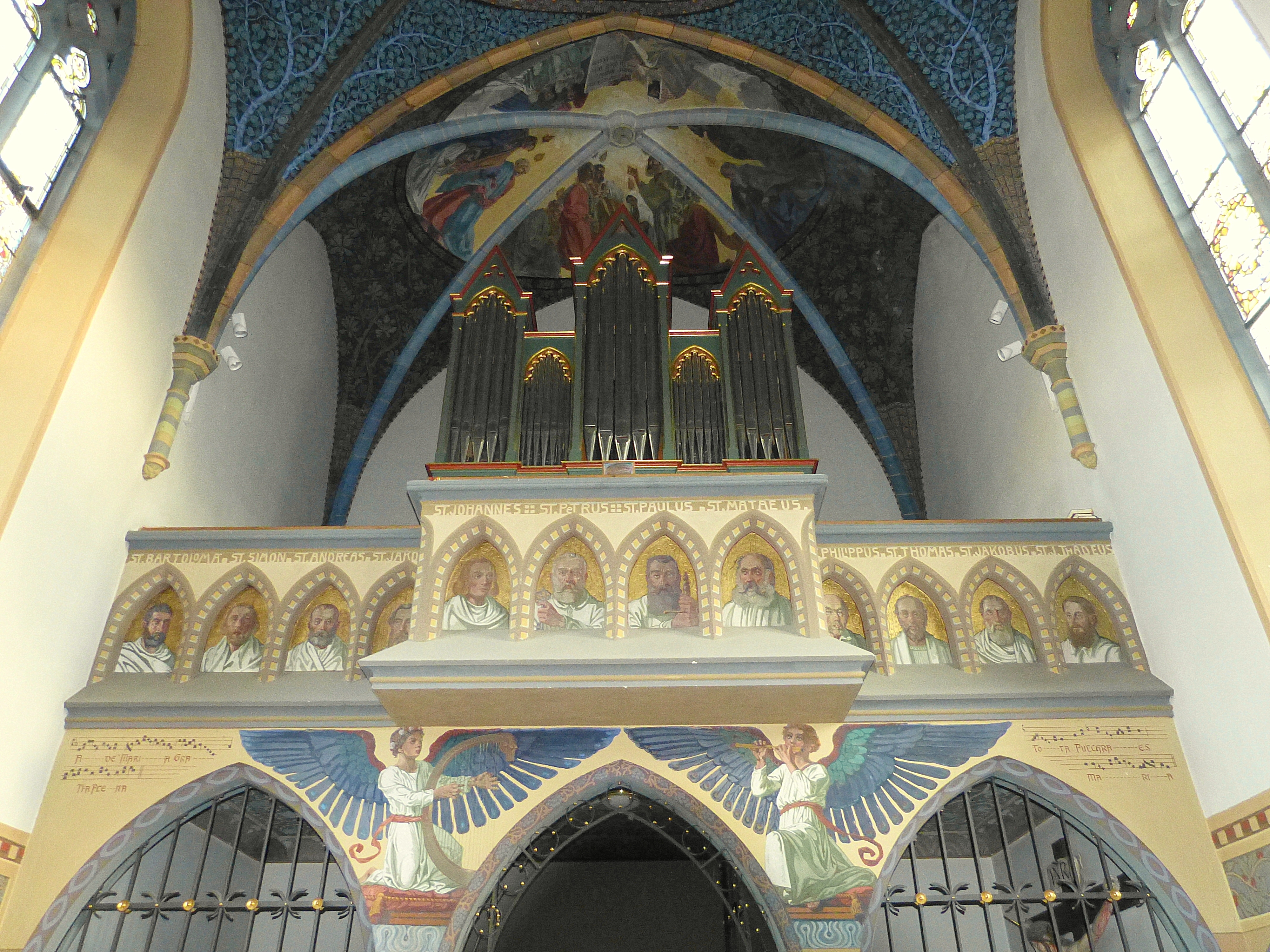 Wallfahrtskirche Maria Hilf am Locherboden, Mötz, Tirol